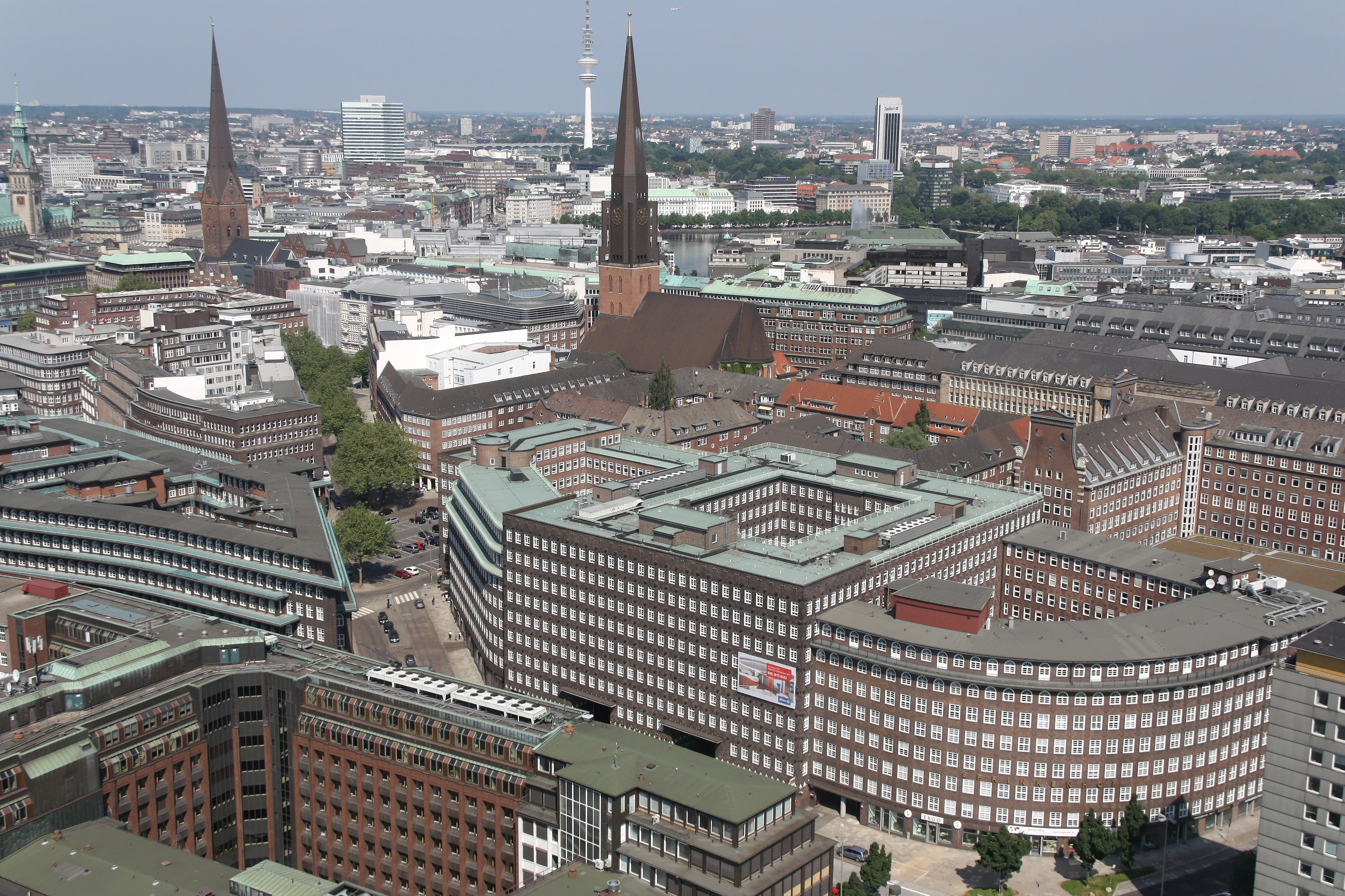 Hamburg, Blick aus dem Fesselballon Highflyer, Kontorviertel mit Chilehaus (links) und Sprinkenhof (rechts), im Hintergrund: Rathaus, Heinrich-Hertz-Turm, St. Petrikirche, St. Jacobikirche, Radisson Hotel